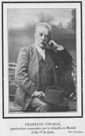 Federico Chueca; fotografía de Franzen